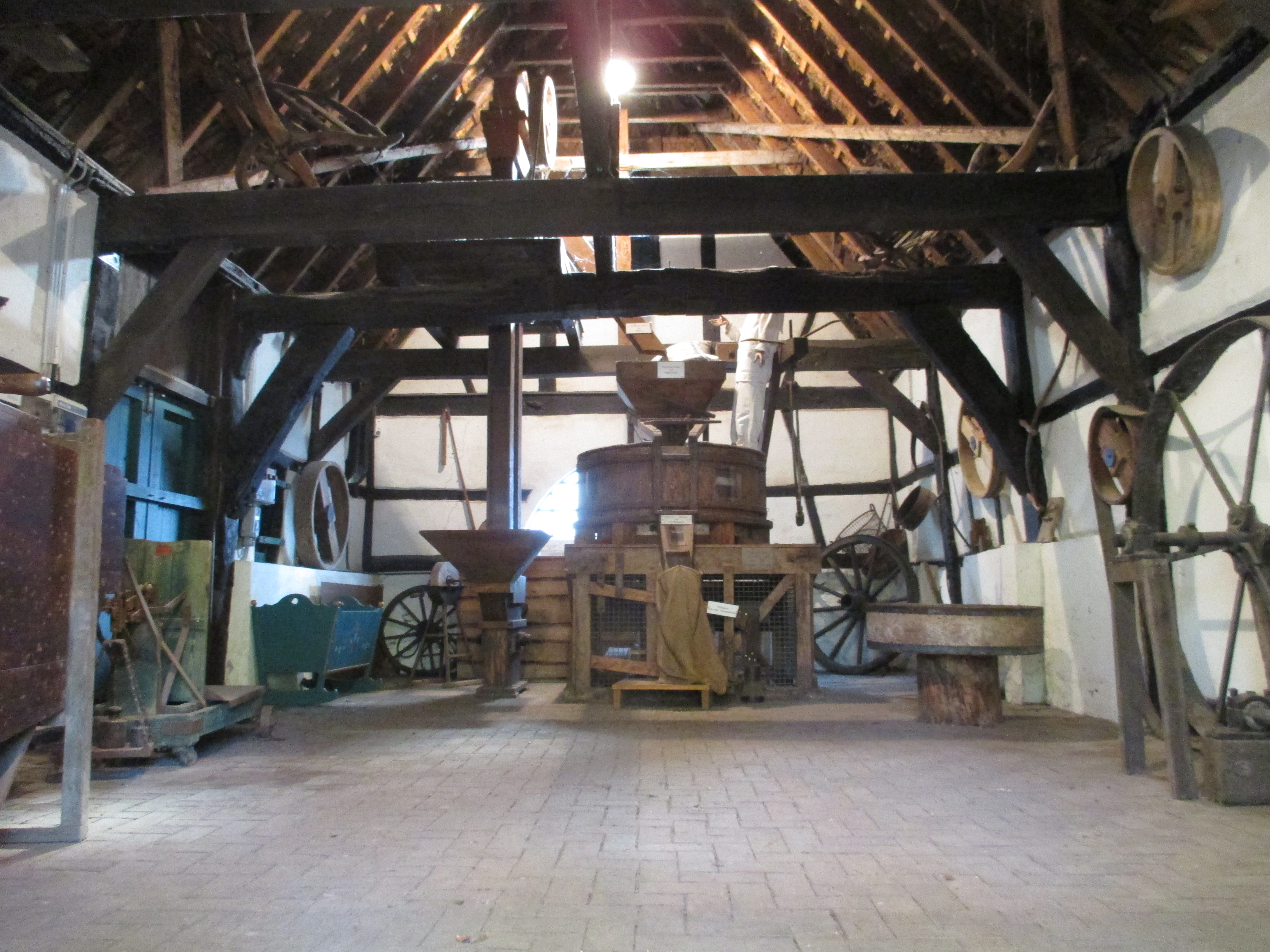 Haus 1 des Mühlenmuseums. Mühleninventar im Fachwerkhaus von 1693.